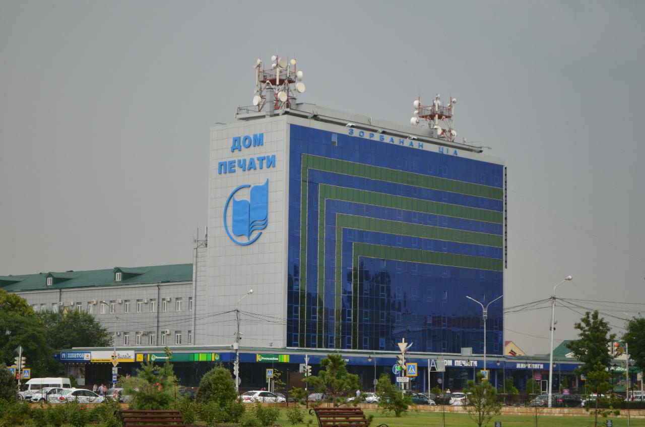 Грозный, Чеченская республика, 26.06.2019. Автобусная экскурсия из Пятигорска